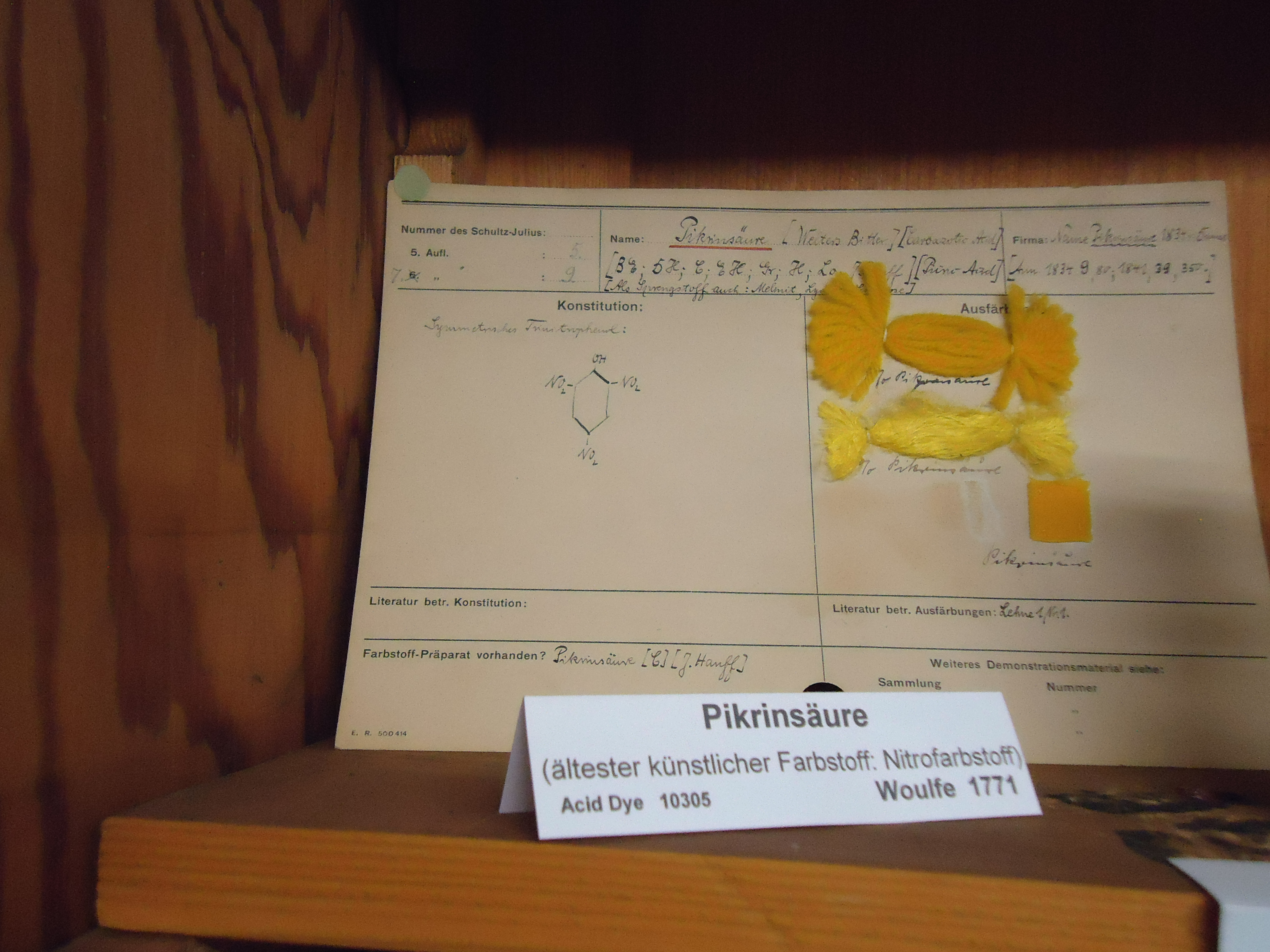 Blick in die Historische Farbstoffsammlung der TU Dresden (Historische Farbstoffsammlung der TU Dresden)